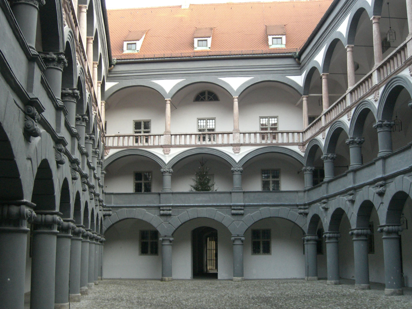 Innenhof der alten Münze in München. Gebäude diente lange Zeit zur Geldherstellung und befindet sich gegenüber dem alten Hof (1. Residenz Münchens) und liegt an der Maximillianstrasse.